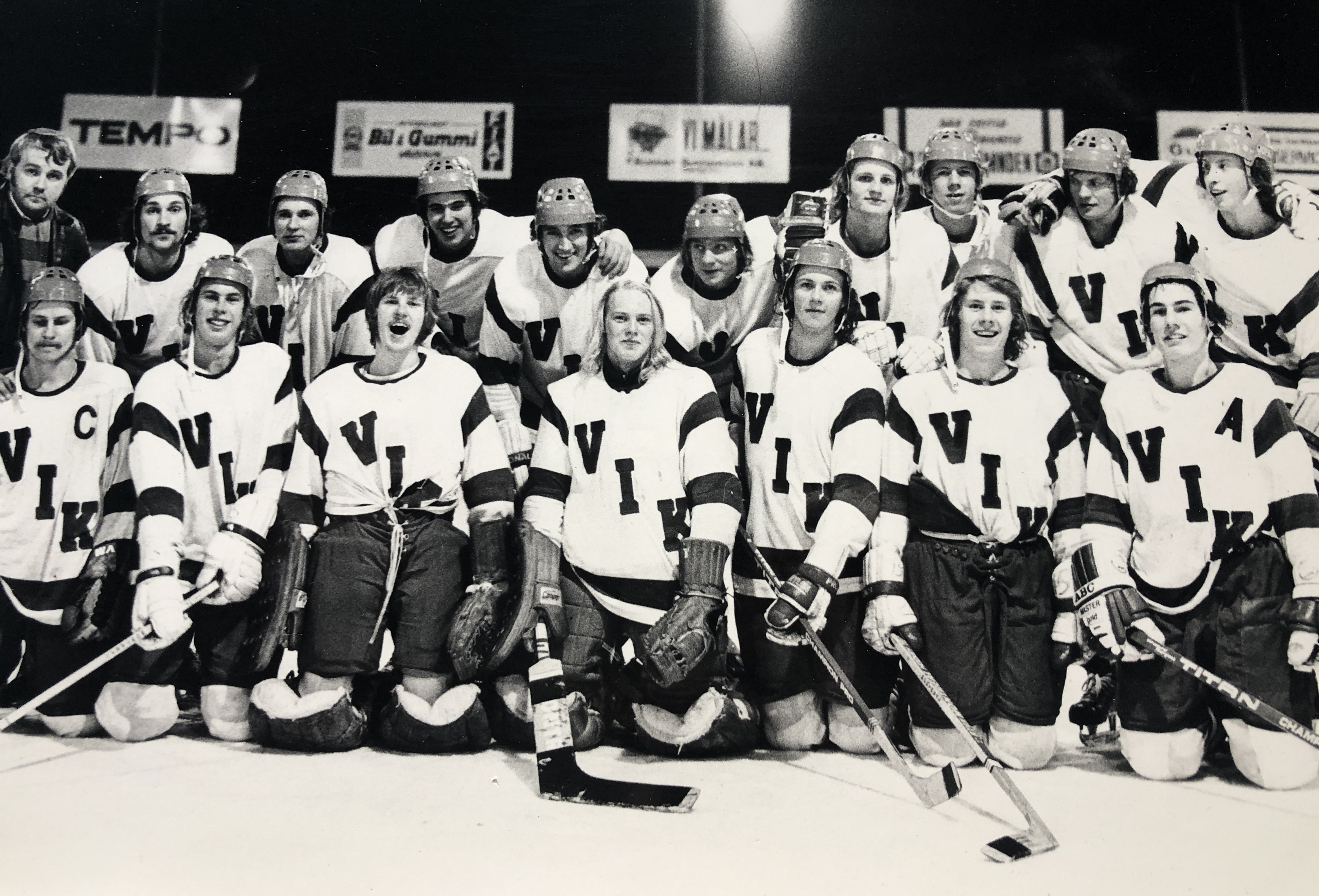 Västerviks IKs hela spelartrupp någon gång på slutet av 70-talet. Vid denna tidpunkt spelade klubben på uterink då den nuvarande ishallen inte hade byggts.